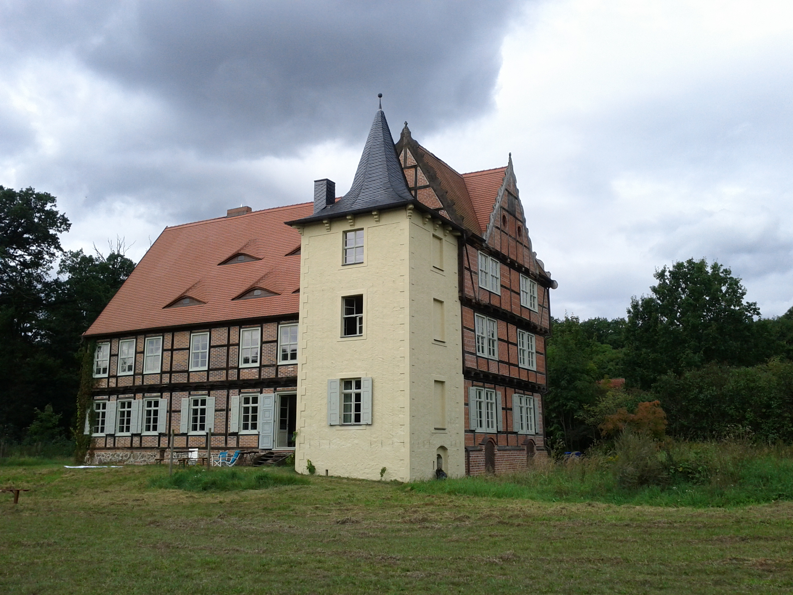 Das Gutshaus Briest im Gutspark Briest, fotografiert von der Gartenseite